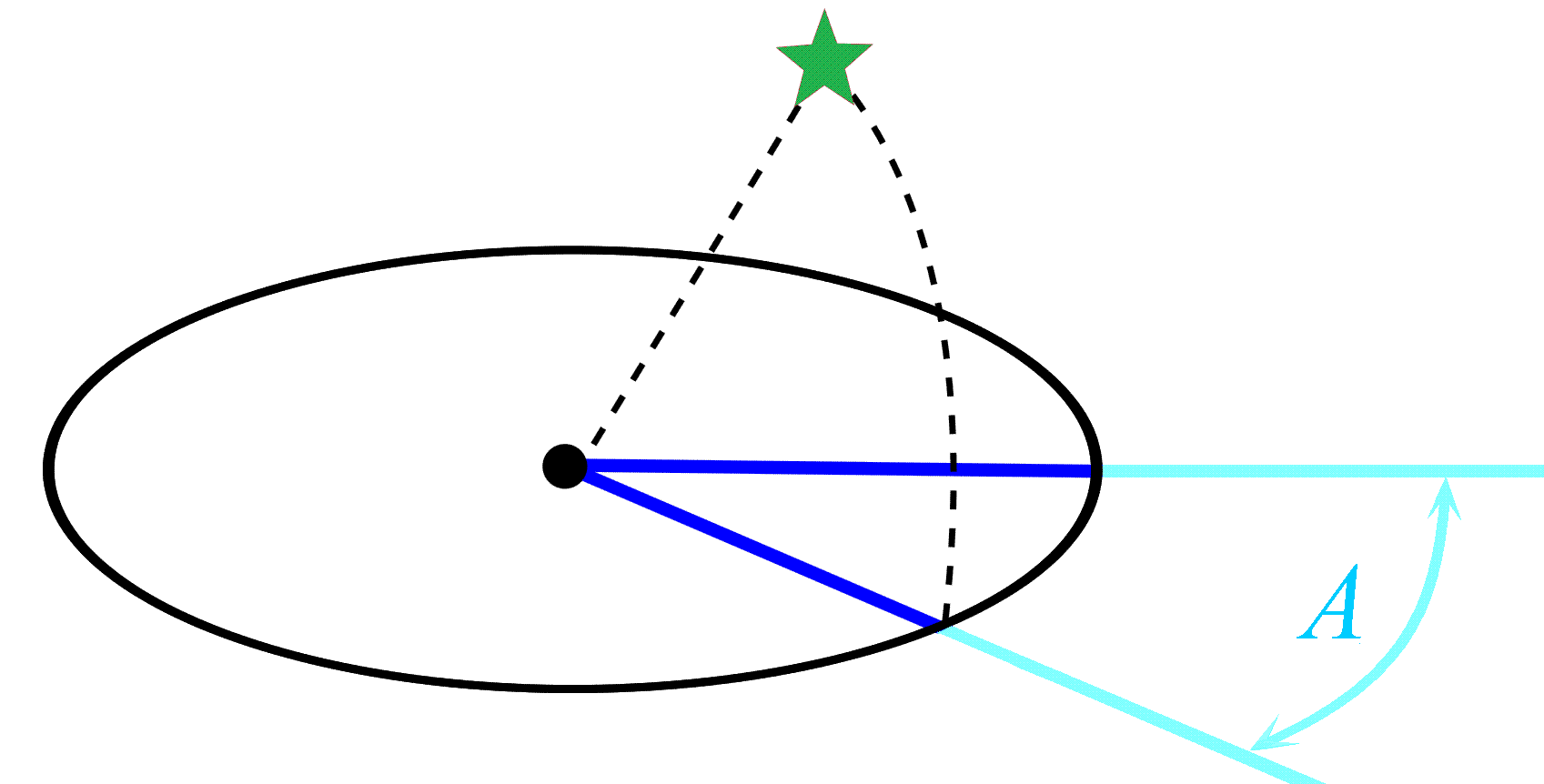 Azimuta angulo (la reference direkto estas dekstren) Verkita de Vikipediisto:Jean-François Clet